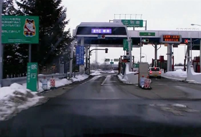 江別東IC料金所